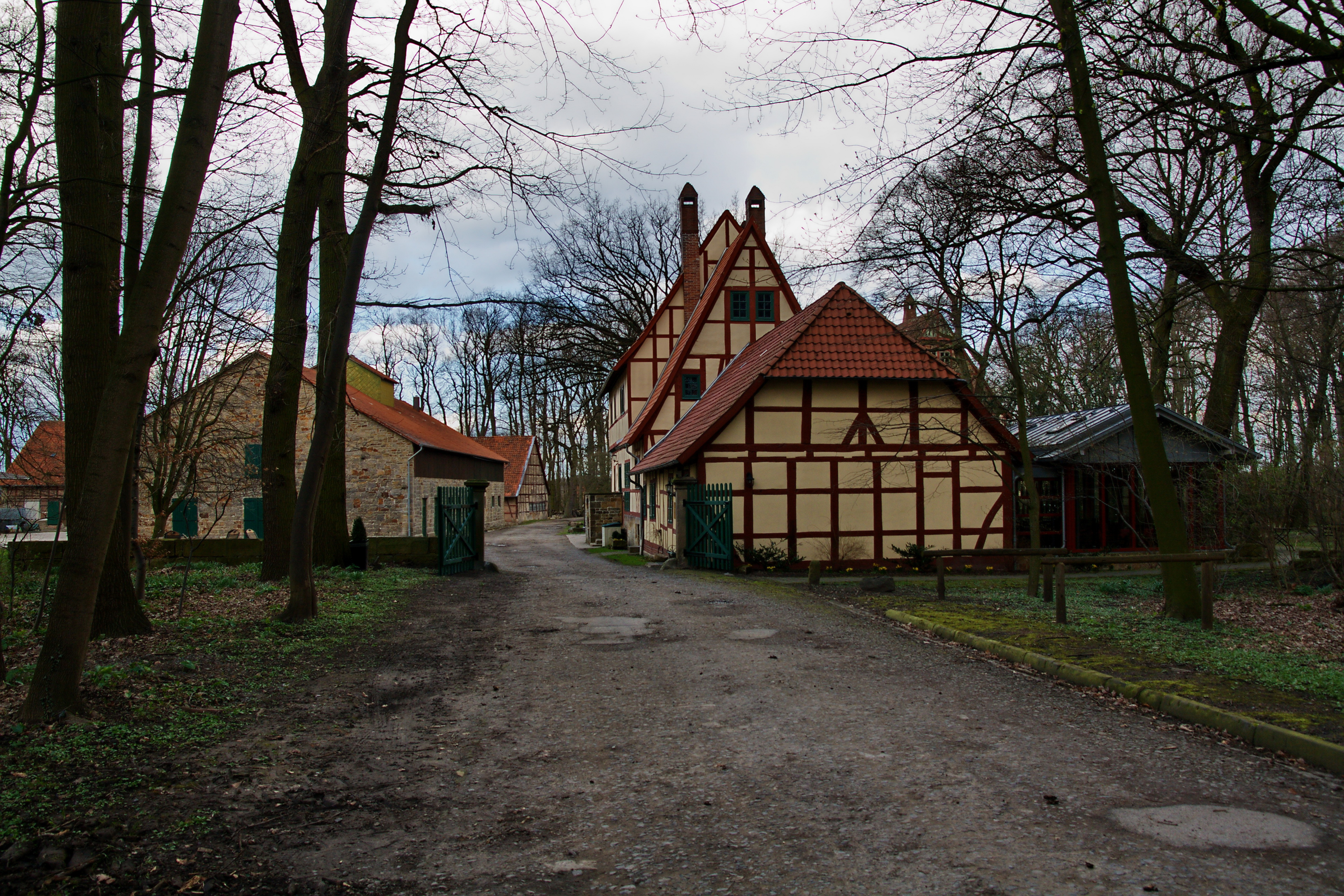 Rittergut in Wichtringhausen (Barsinghausen), Niedersachsen, Deutschland